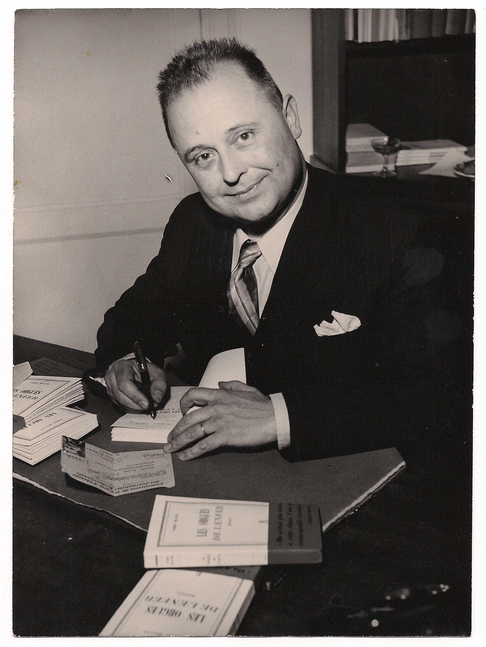 Cette photo de Pierre MOLAINE a été prise dans les locaux de la maison d'éditions Corrêa lors d'une séance de dédicaces réalisée à la faveur de la remise du Prix Renaudot en décembre 1950.